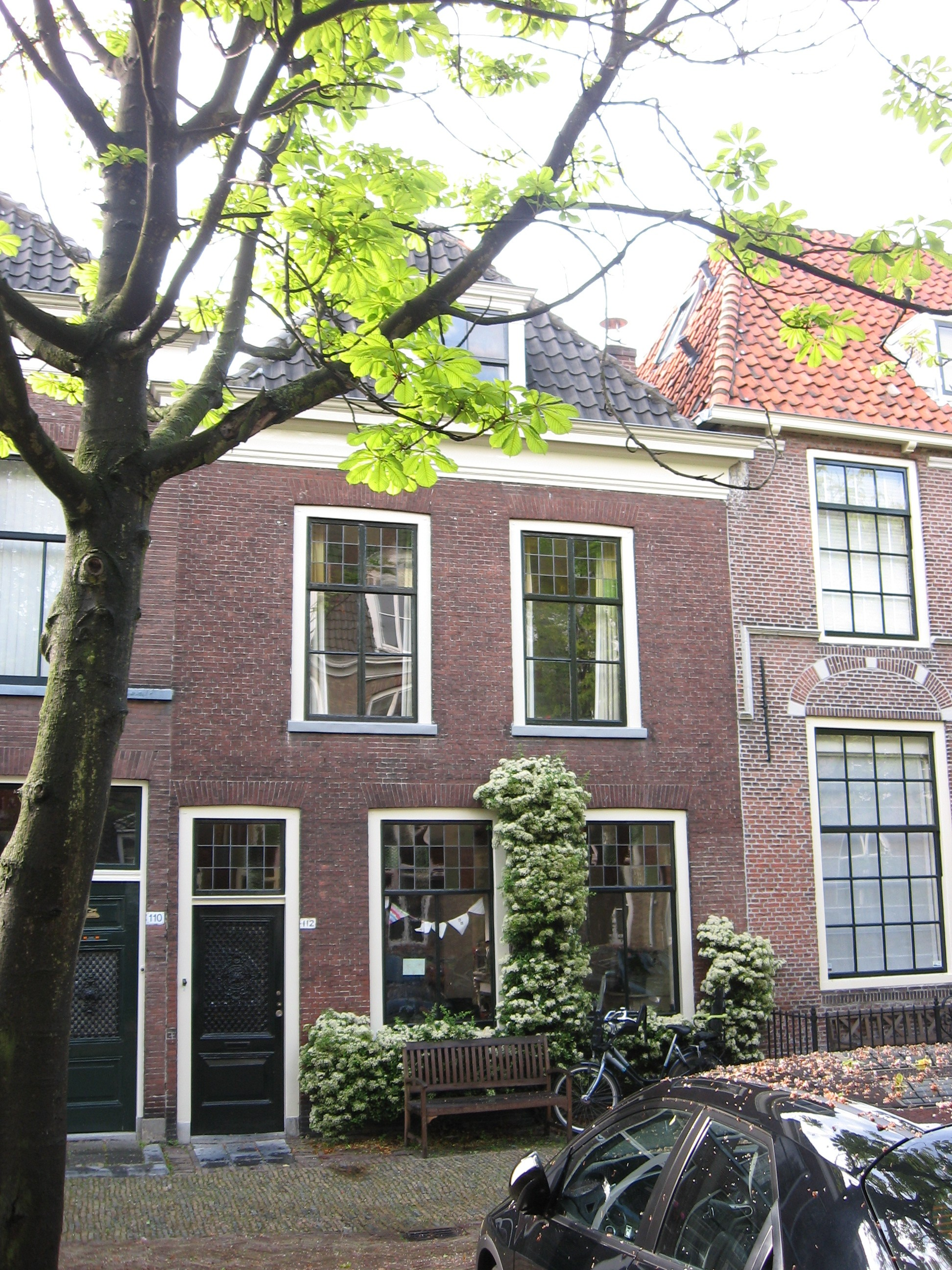 Delft - Bagijnhof 112.jpg, rijksmonument